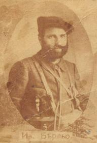 Иван Бърльо.